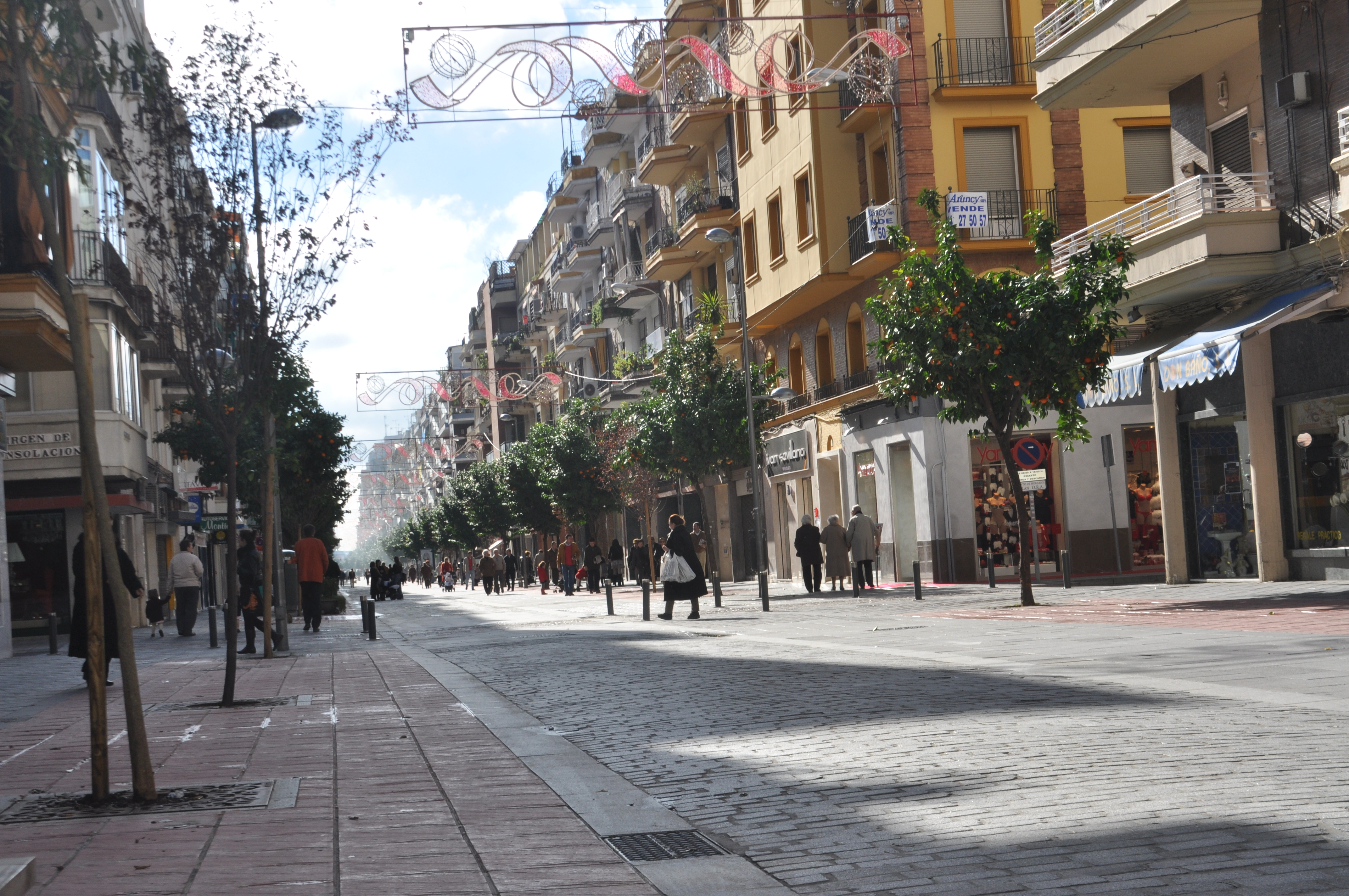 Vista de la calle Asunción de Sevilla